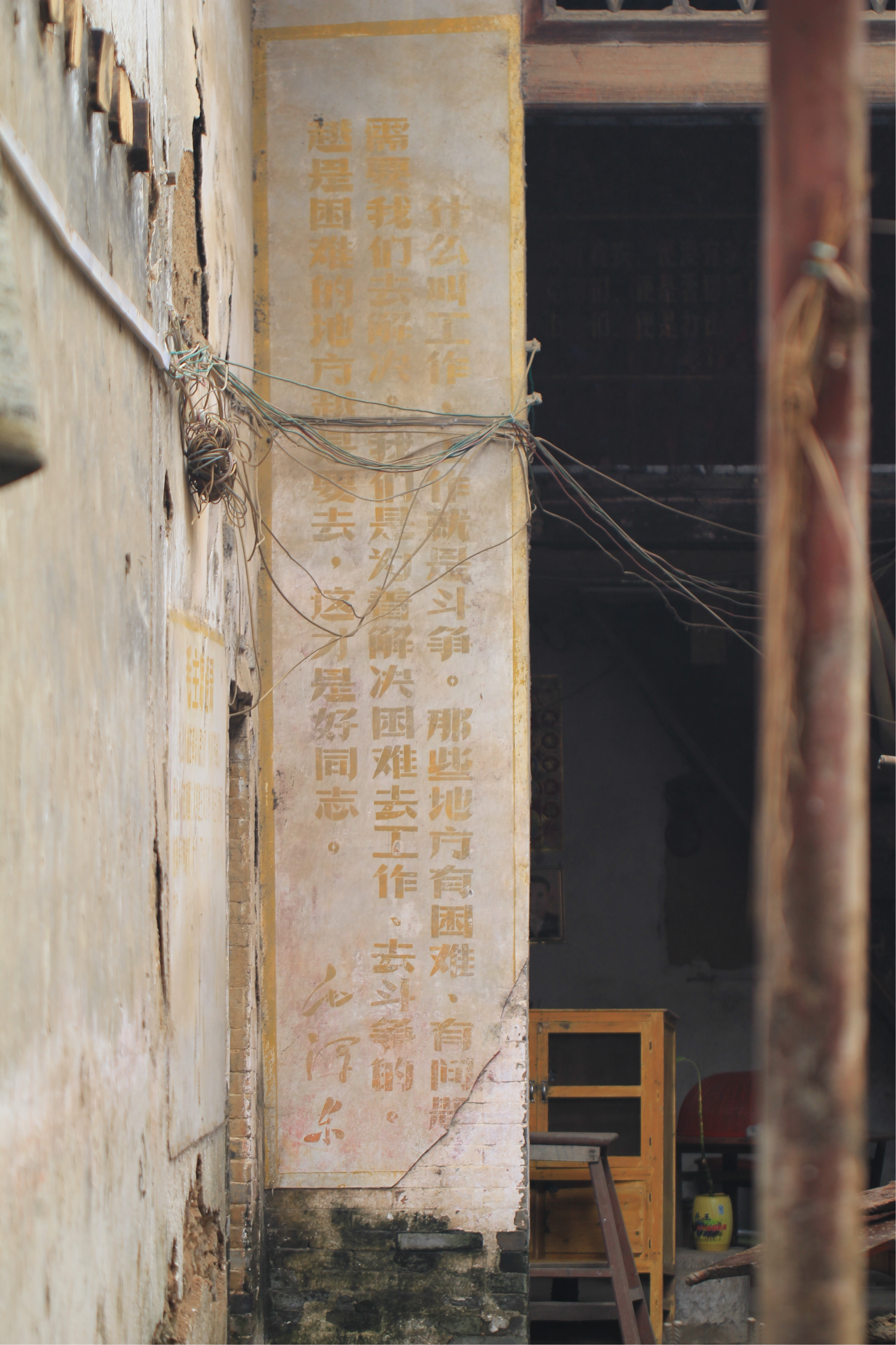 中国广西柳州市武宣县，毛主席语录